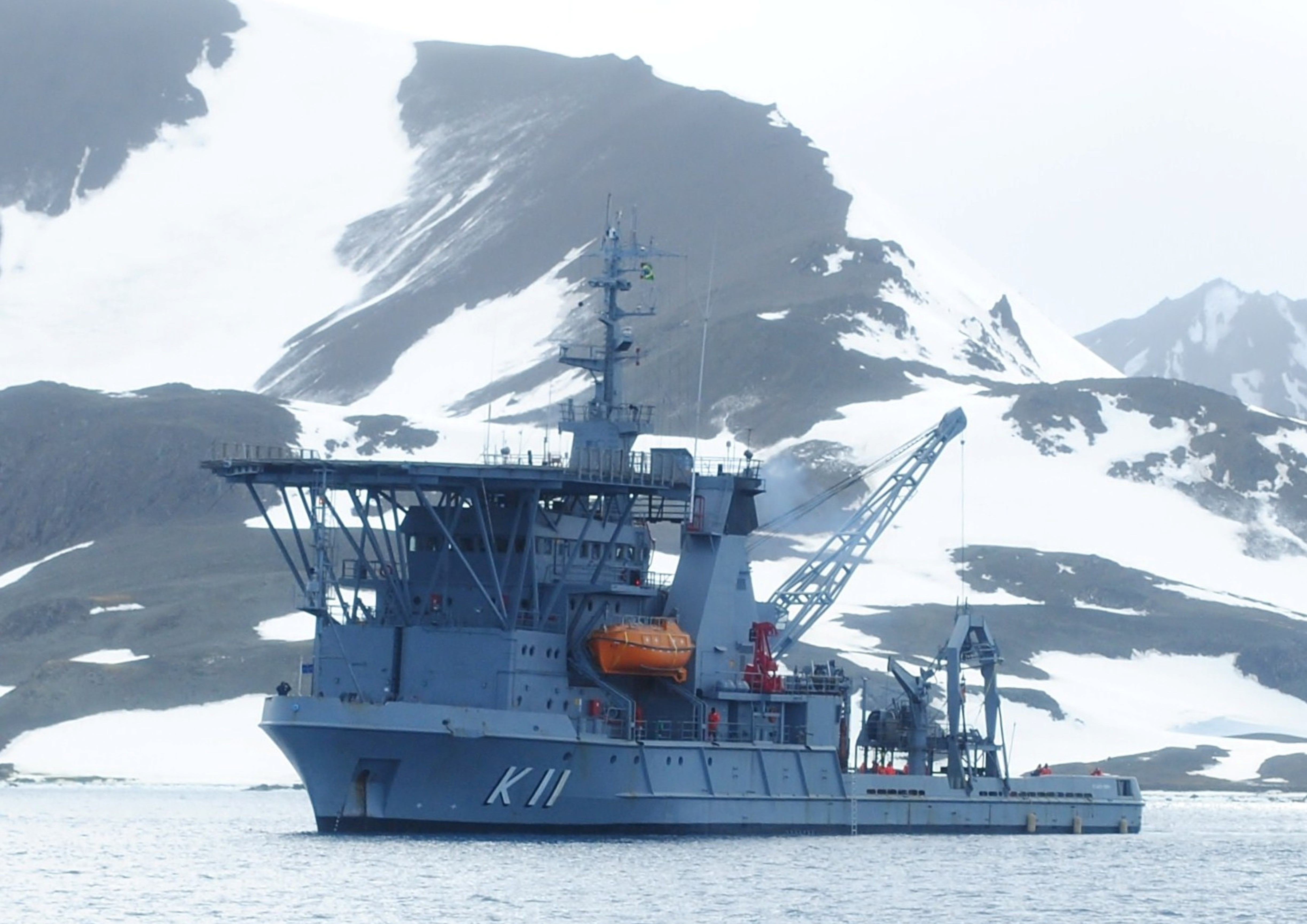 Arquivo liberado pela Marinha do Brasil através de projeto GLAM com Wiki Educação Brasil